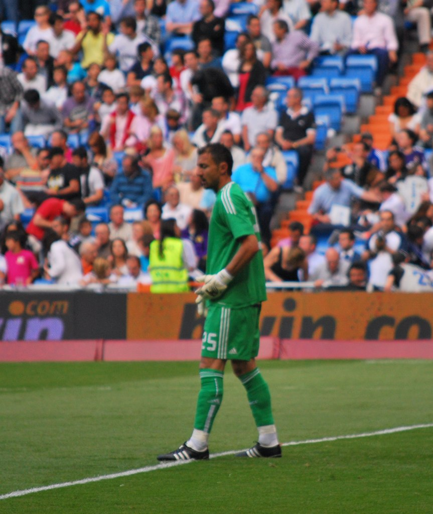 Jerzy Dudek durant de son dernier match, lors d'un match entre le Real Madrid et l'UD Almería.